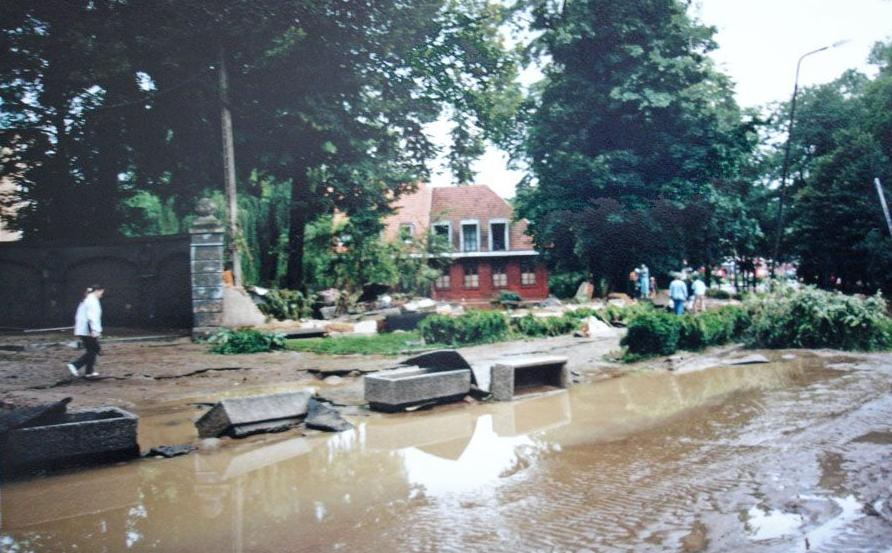 Ulica Daszyńskiego w Kłodzku podczas powodzi z 1997 roku